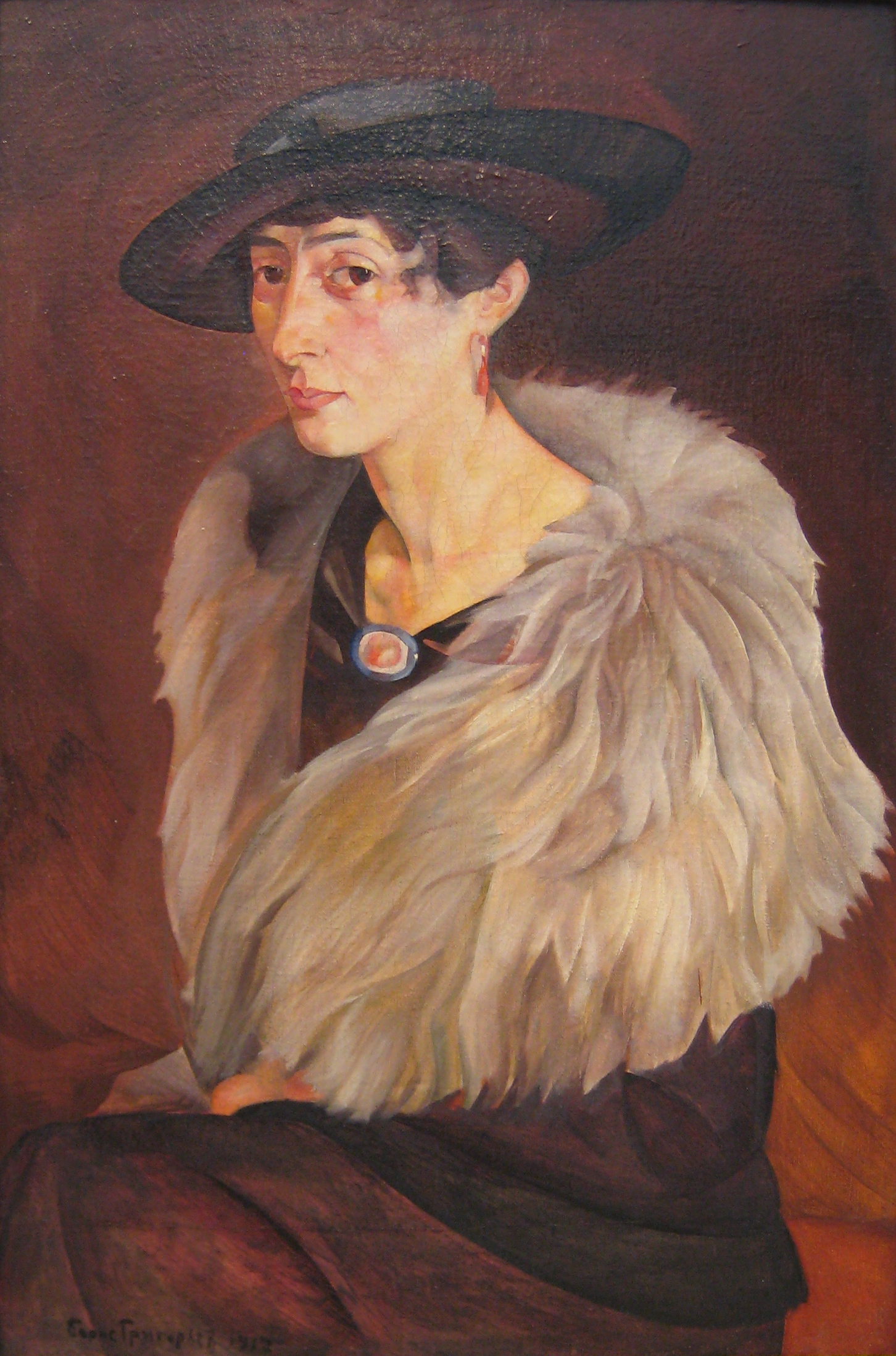 Грилихес Анна Ефремовна (1917) жена известного петербургского врача М.С. Грилихеса